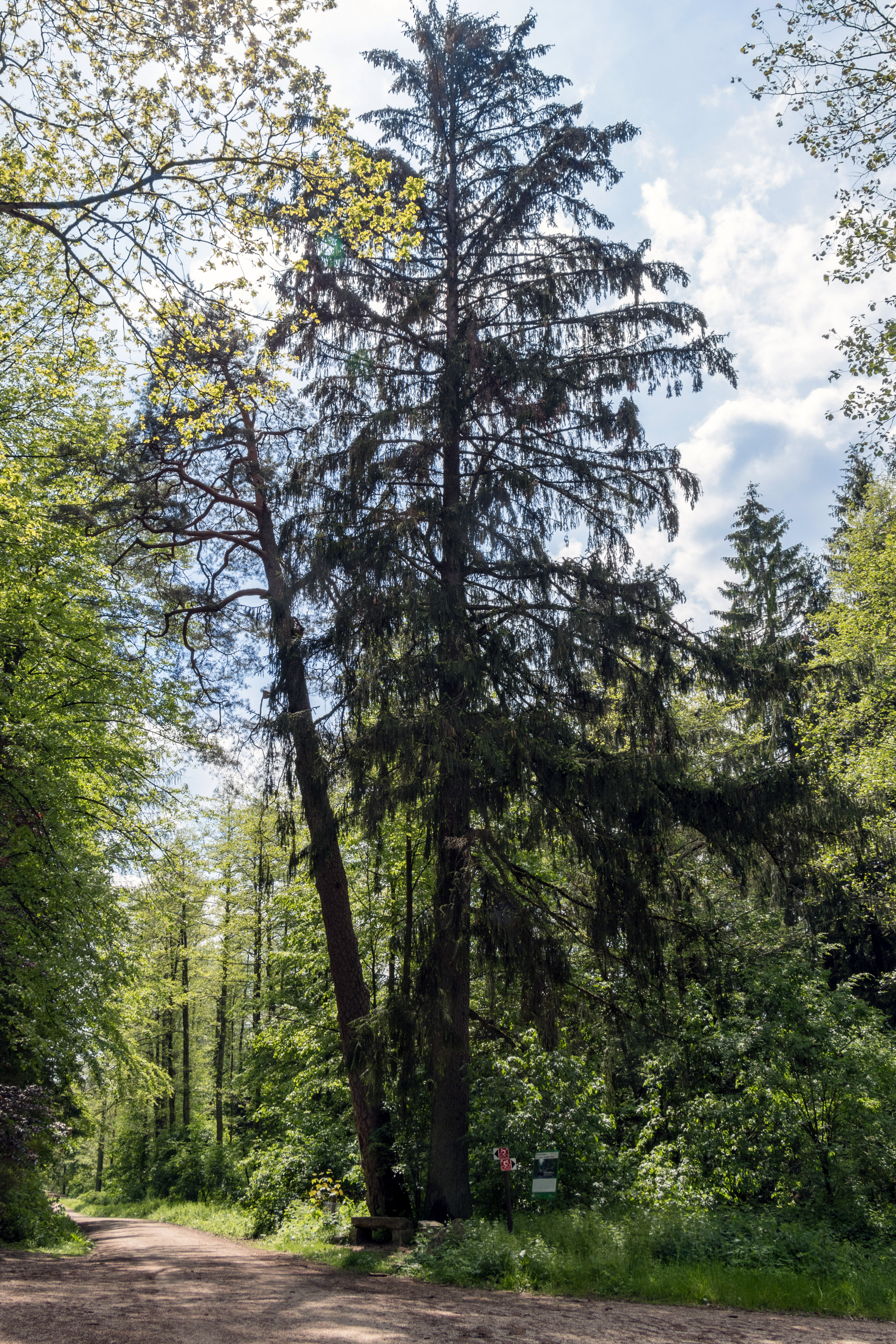 Kiefer und Fichte an der Steinernen Bank, Engelthal, Naturdenkmal